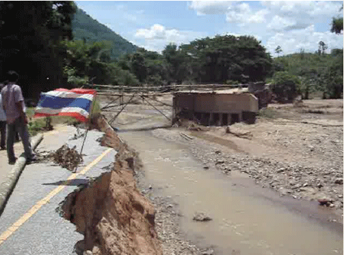 ลำน้ำพัดสะพานและถนนขาด ที่อำเภอท่าปลา จังหวัดอุตรดิตถ์ Mudflow.Tha pa,Uttaradit, Thailand.